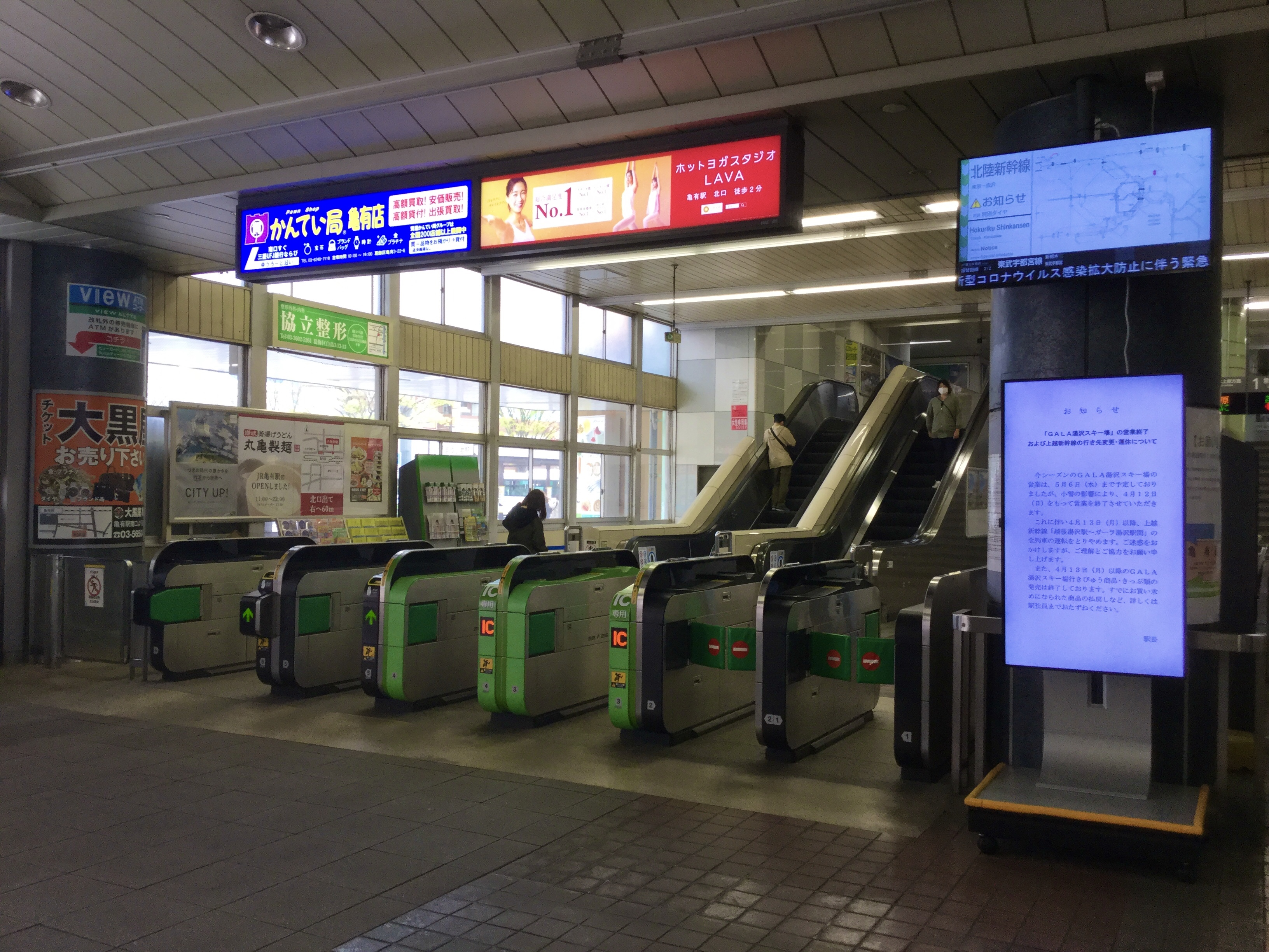 亀有駅改札